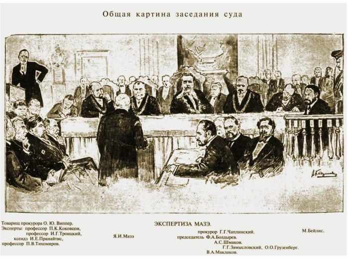 Дело Бейлиса - Общая картина заседания суда. Рисунок Владимира Кадулина